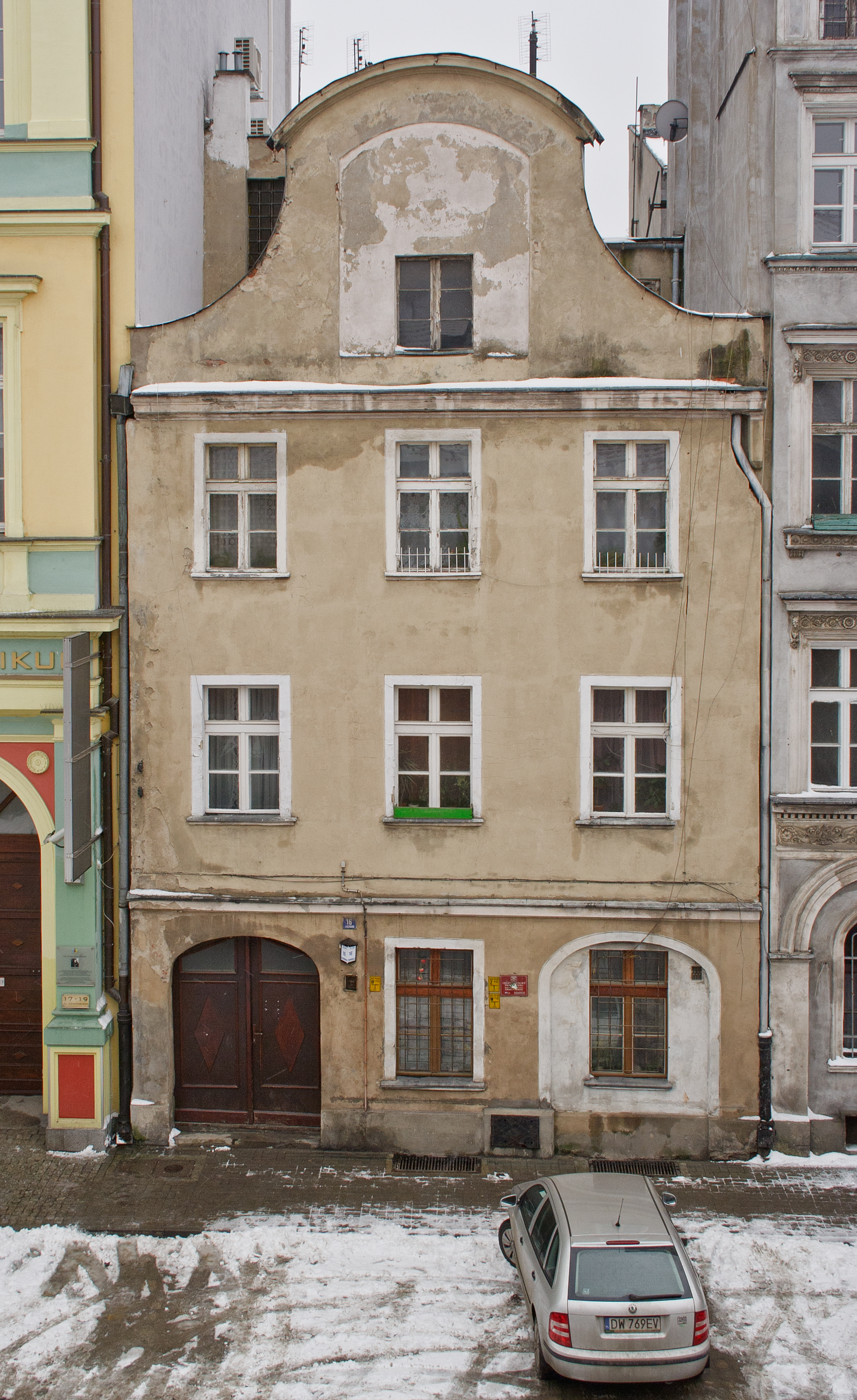 Kamienica czynszowa z XVI w. przebudowana w XVIII w. przy ul. Cieszyńskiego 16 we Wrocławiu